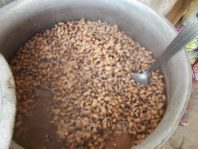 Haricot préparé This is an image of food from Togo